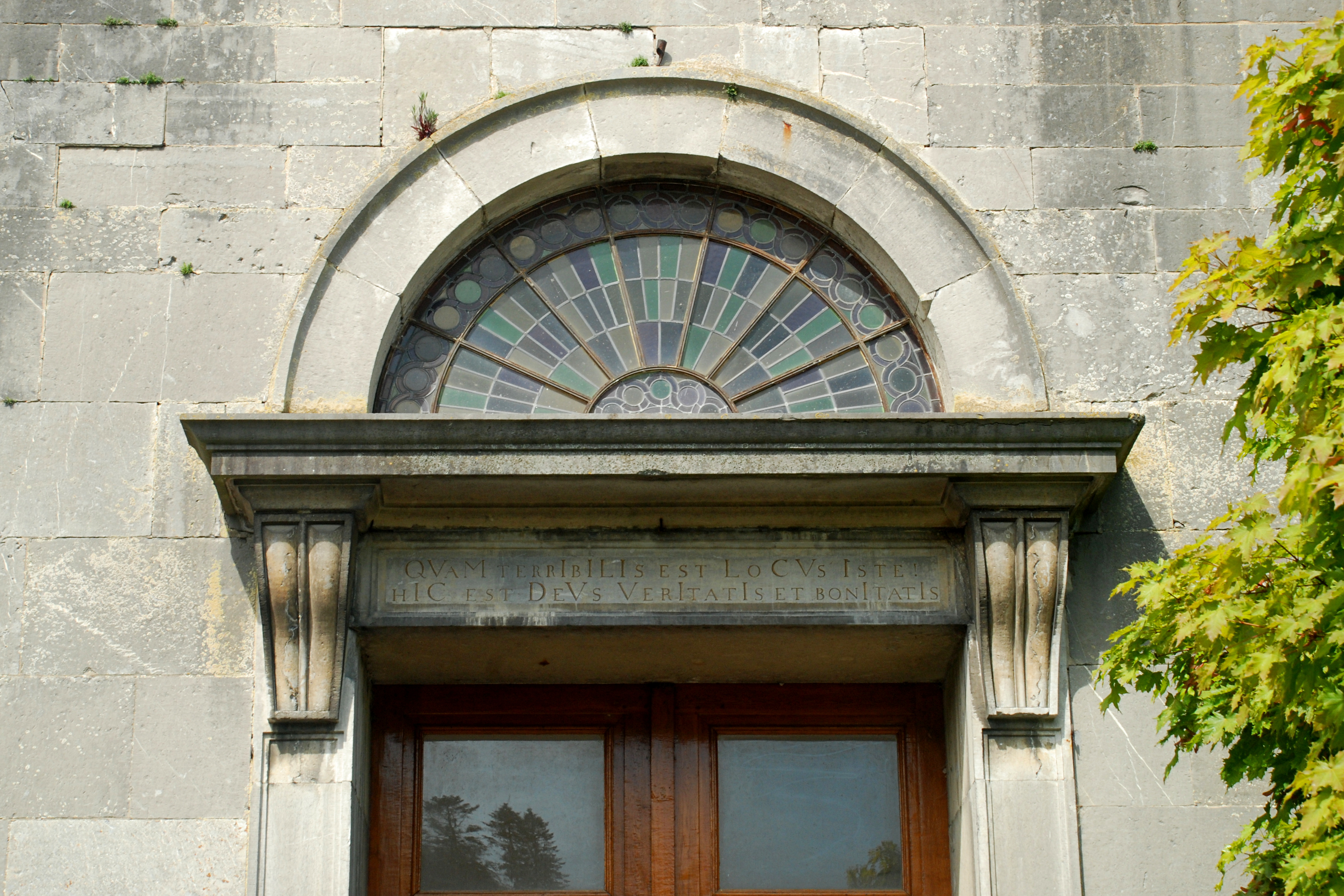 Belgique - Province de Namur - Viroinval - Nismes - église Saint-Lambert (1829)